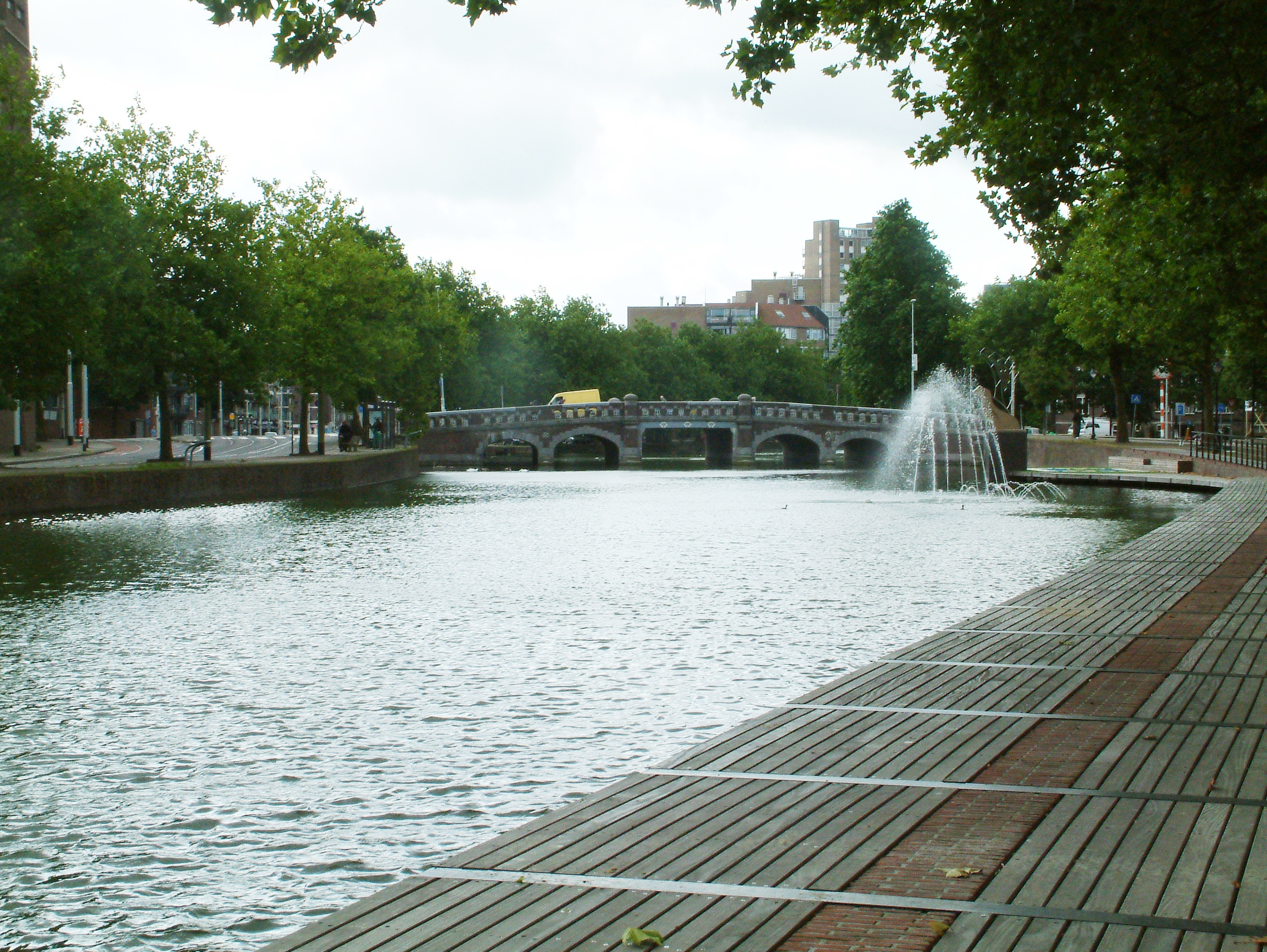 Bruggen over de Rotte, De Noorderbrug, noordkan